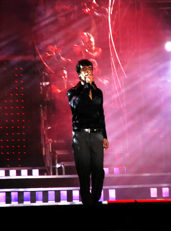 Harel skaat, 'Volume Tel-Aviv' 2006